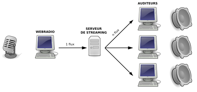 Schéma de diffusion d'une webradio, depuis le studio (à gauche) jusqu'aux auditeurs (à droite), en passant par le serveur de streaming (au centre).